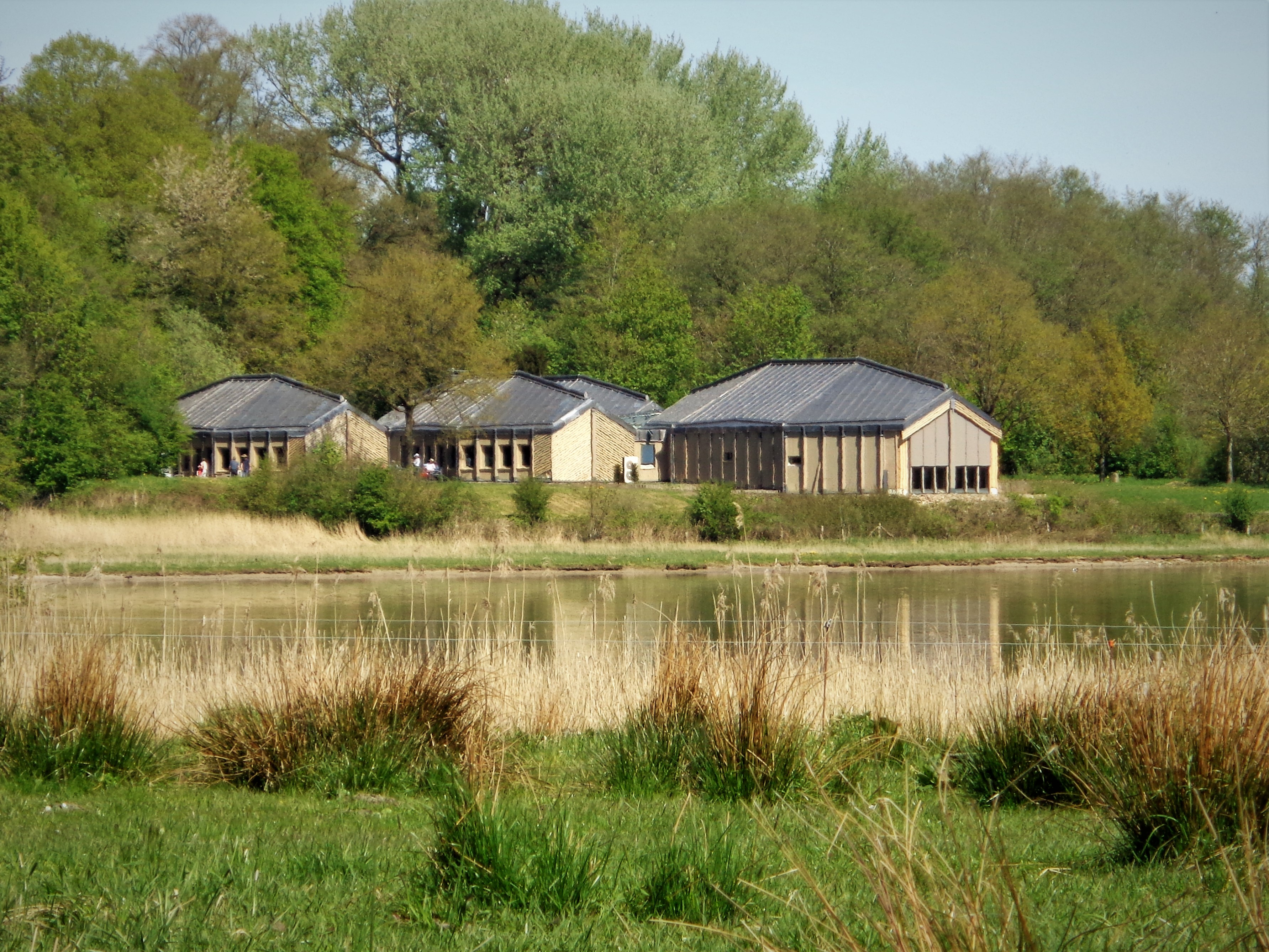 Blick auf das Wikinger-Museum Haithabu, das nach umfangreichen Instandsetzungsarbeiten im Mai 2018 wiedereröffnet wurde.